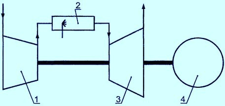 Схема простейшего, единичного силового агрегата газотурбинной электростанции